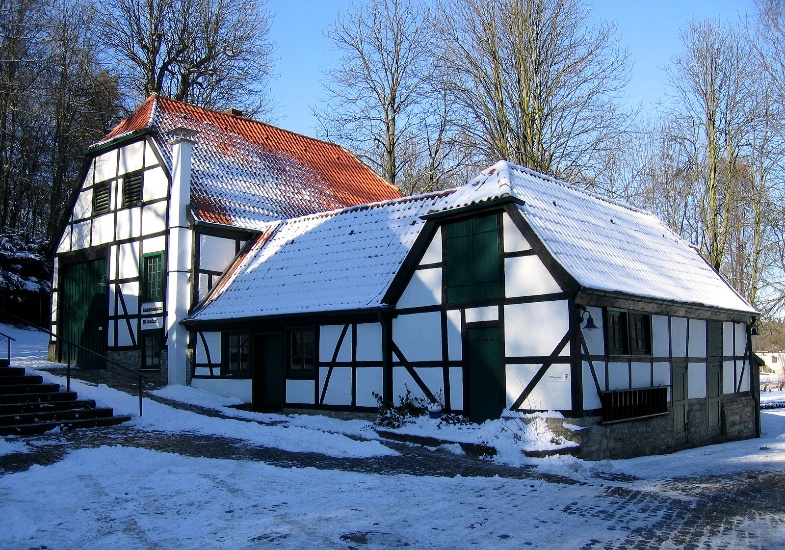 Description: Historische Fabrikenanlage Maste-Barendorf (um 1850) in Iserlohn, Haus B (Ökonomiegebäude: Stallungen, Lagerräume). Im linken Gebäude befindet sich das Nadelmuseum Barendorf. Source: selbst fotografiert Date: 29. Jan. 2006 Author: Bubo